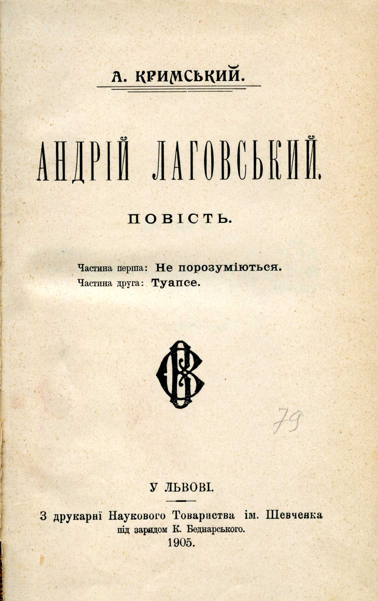 Видання перших двох частин роману "Андрій Лаговський" окремою книгою. Львів, 1905.